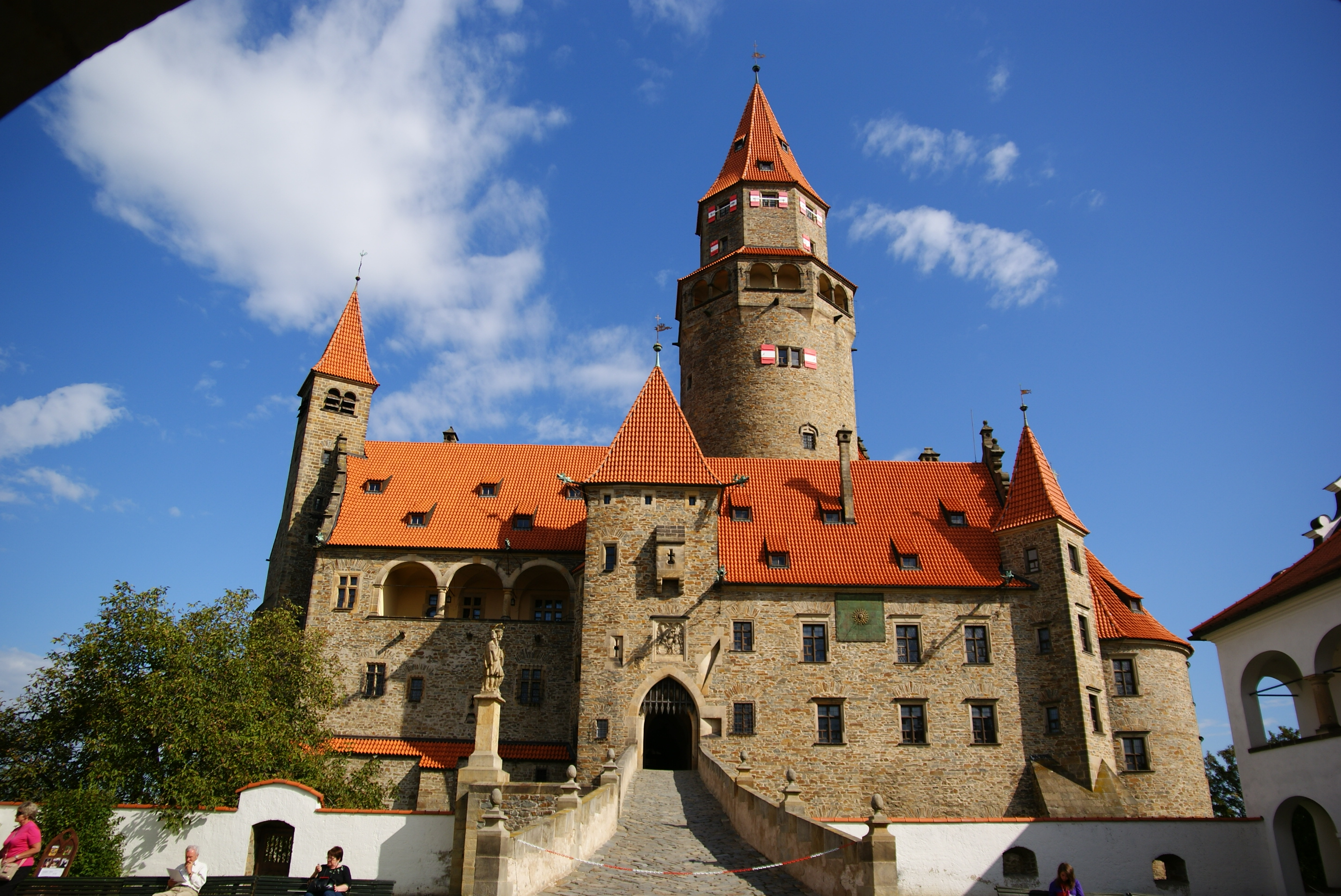 Hrad Bouzov (Bouzov), Bouzov 8